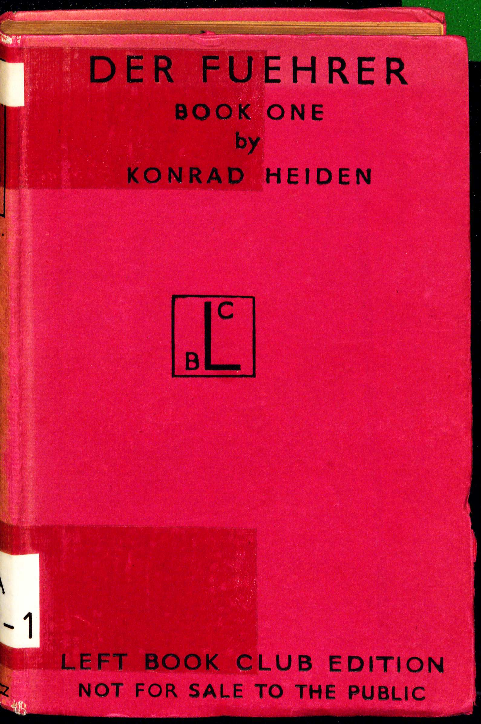 Konrad Heiden Der Fuehrer 1944 title